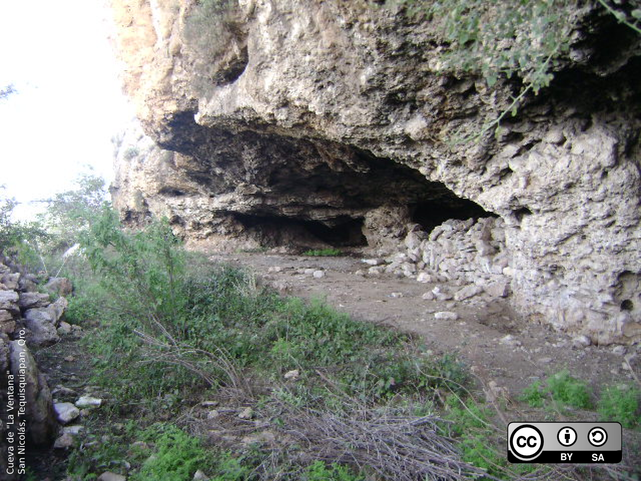 Fotografía de la cueva de "La Ventana" localizada en el cerro de la bolita en San Nicolás, Tequisquiapan, Qro. donde la arqueóloga Cynthia Irwin-Williams encontró restos de huesos humanos y utensilios.